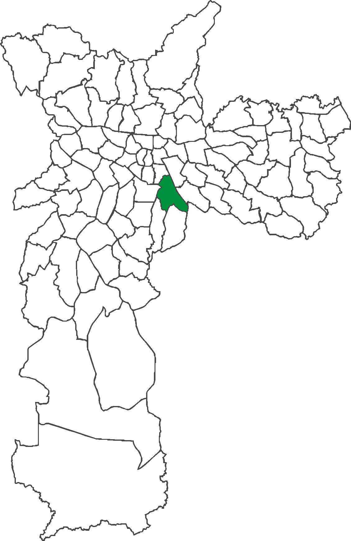 Localização do distrito do Ipiranga no município de São Paulo.